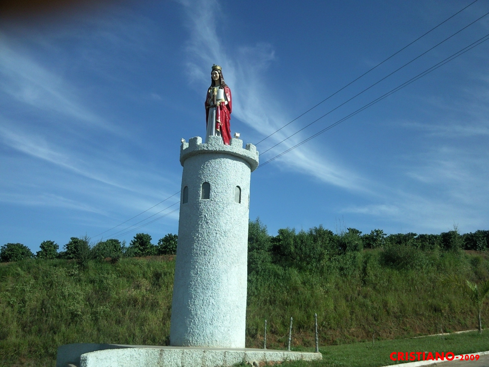 padroeira de guaranesia